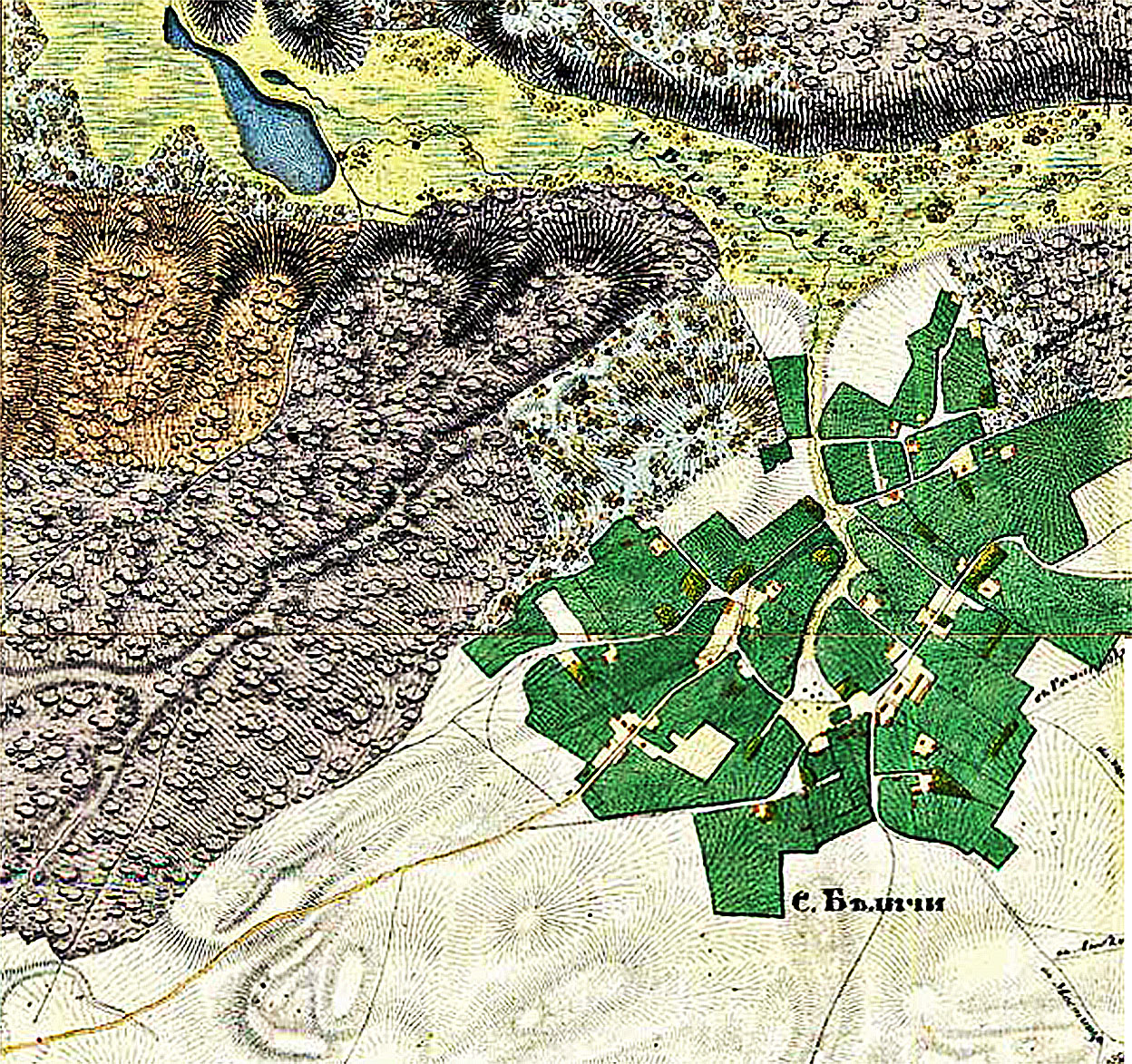 План с. Біличі. Вгорі – річка Борщагівка і Святошинський став, ліворуч – балка Шалена Баба, праворуч – шлях на Романівку. Фрагмент мапи Київа 1842 року